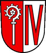 Wappen: Quarten siehe auch: Copyright Wappen St. Gallen